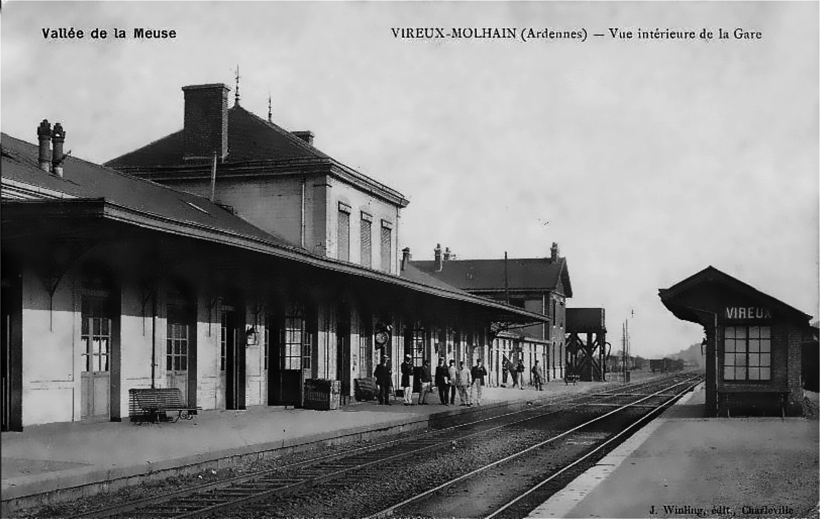 Intérieur de la gare de Vireux-Molhain, dans le département des Ardennes, vers 1900.